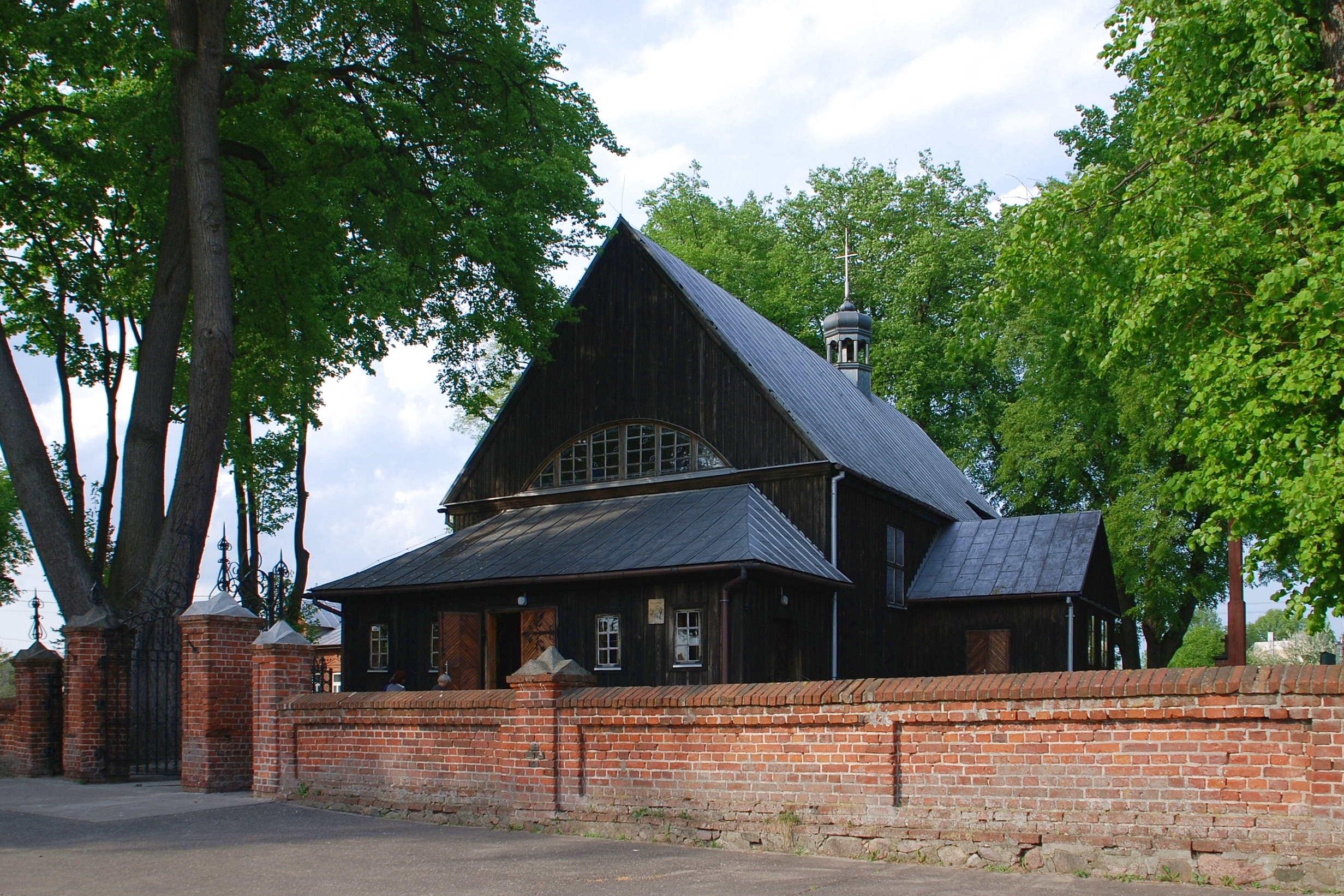 Lubowidz, ul. Poświętna 4 - rzymskokatolicki kościół parafialny pw. św. Andrzeja Apostoła, 1802, 1860, 1937, 1966